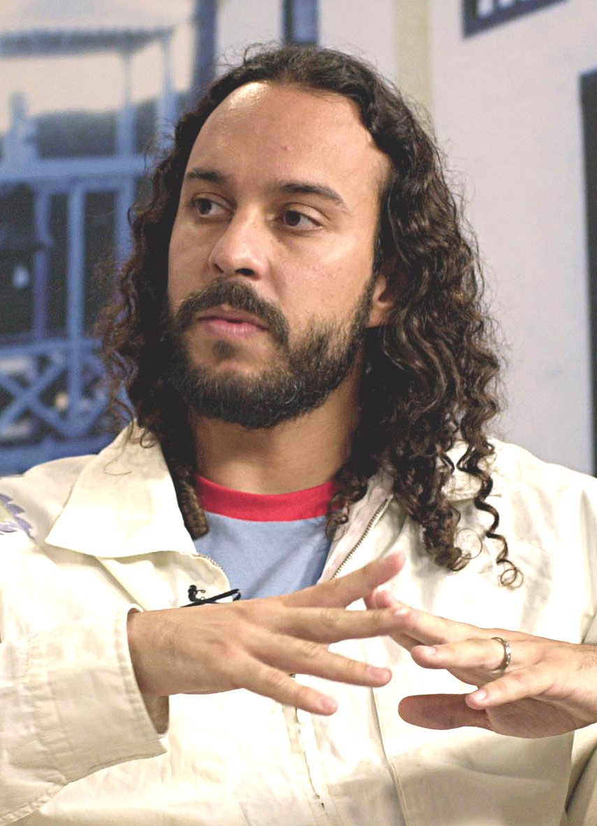 O cantor brasileiro Gabriel, O Pensador.